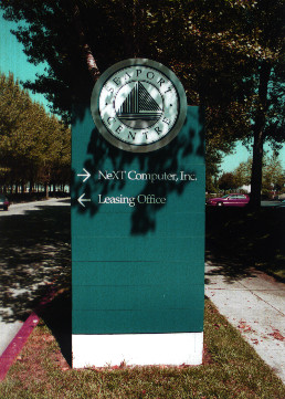 NeXT Computer 社の場所を示す表示板